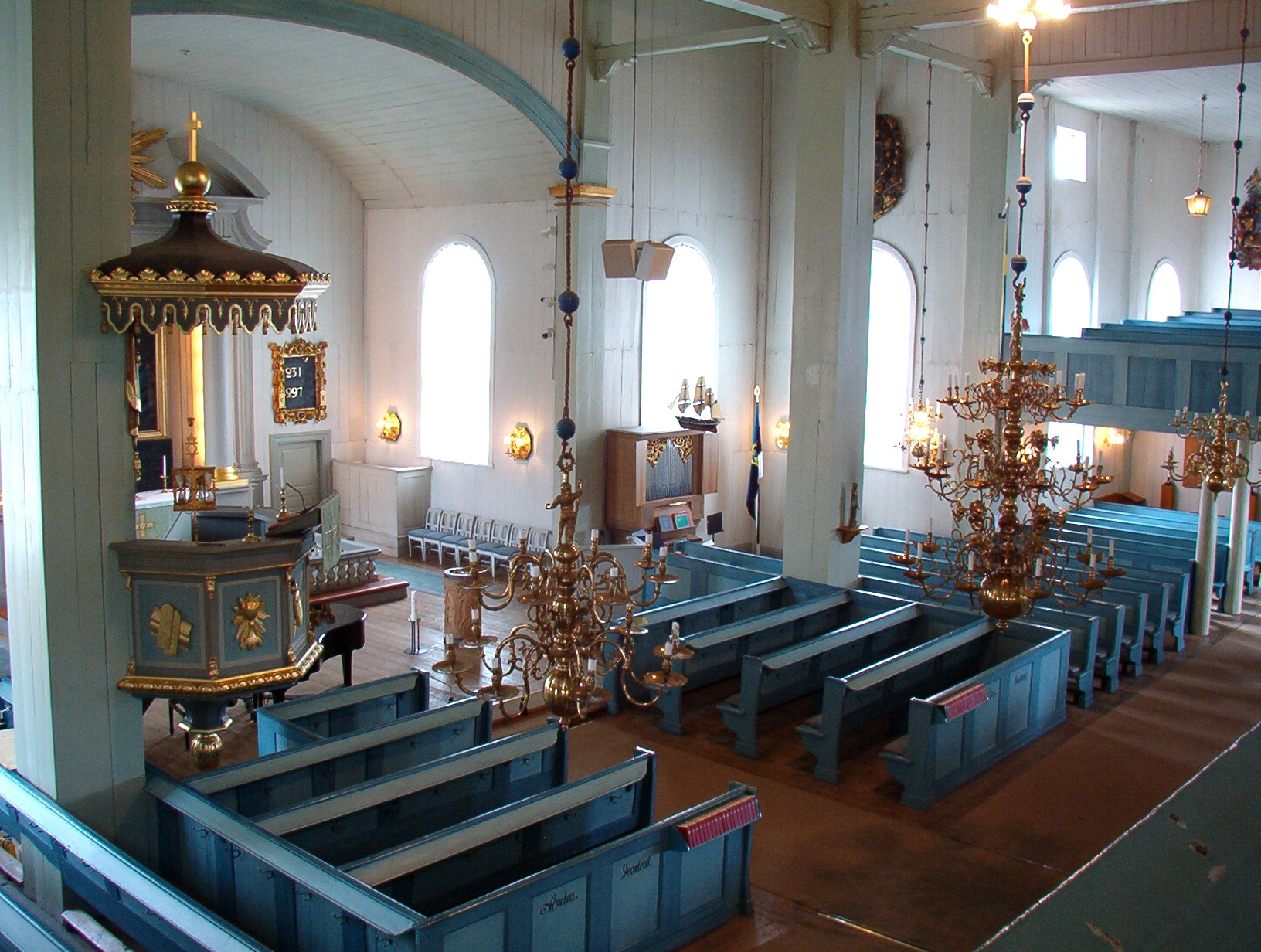 Date August 2005